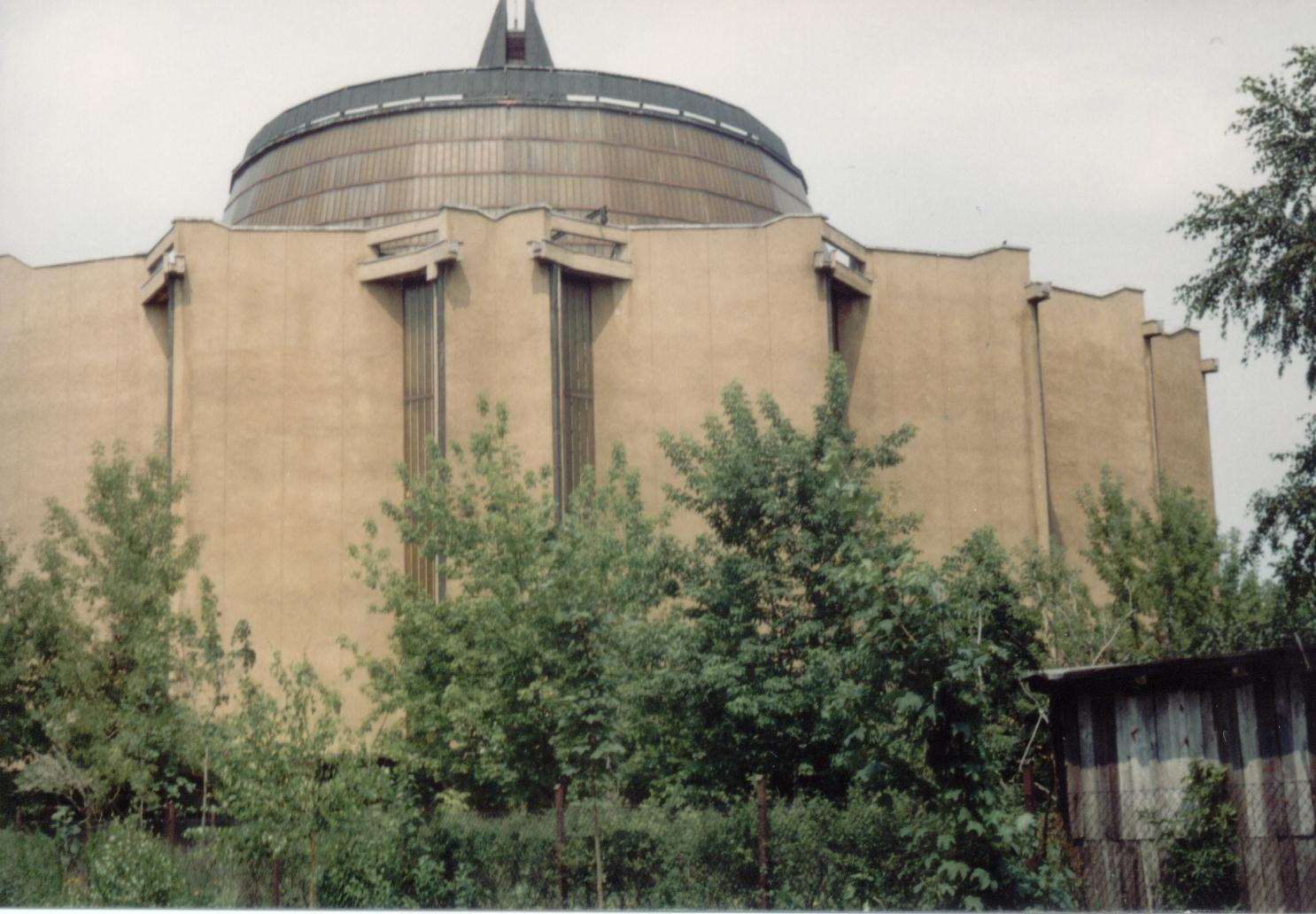 Kościół NSJ